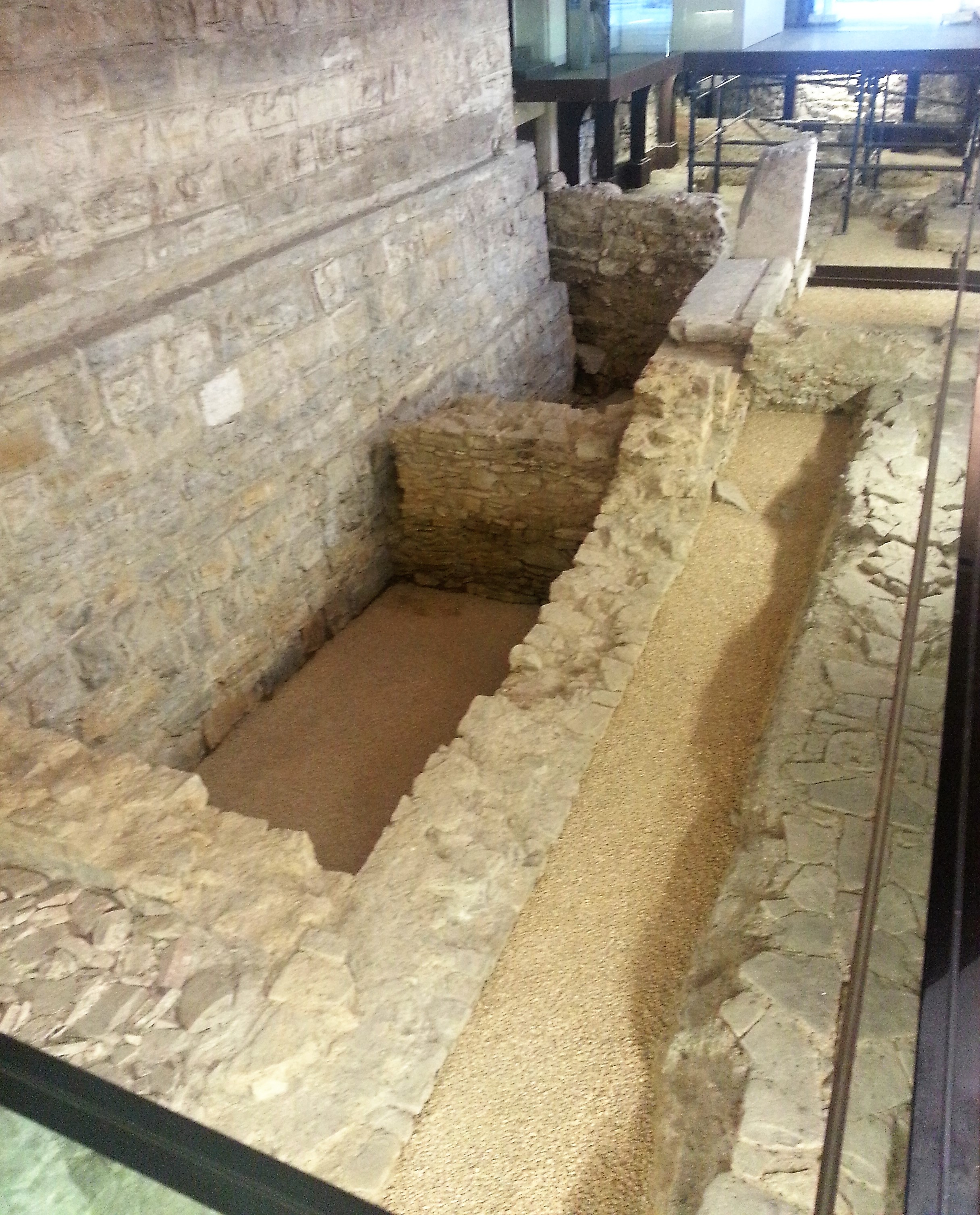 recupero di scavi romani all'ingresso del museo del cinquecento